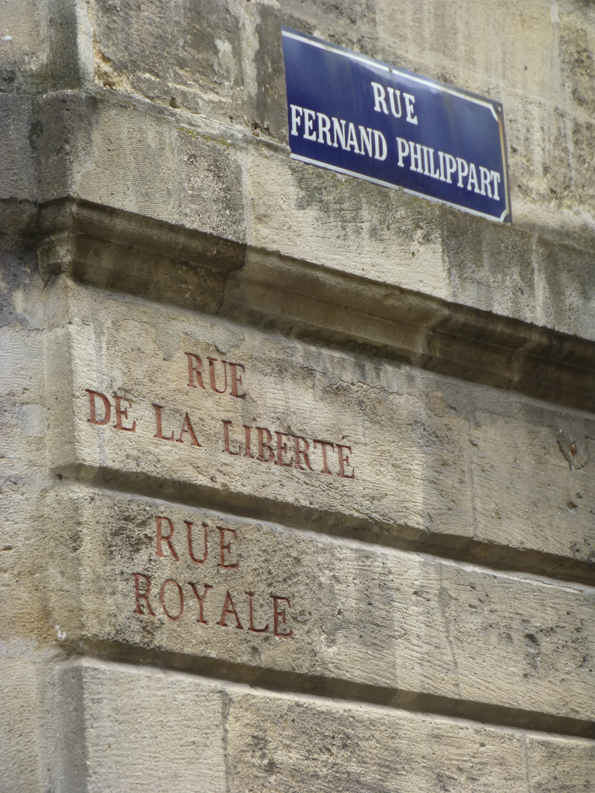 Bordeaux, Noms de rue, quartier Saint-Pierre.